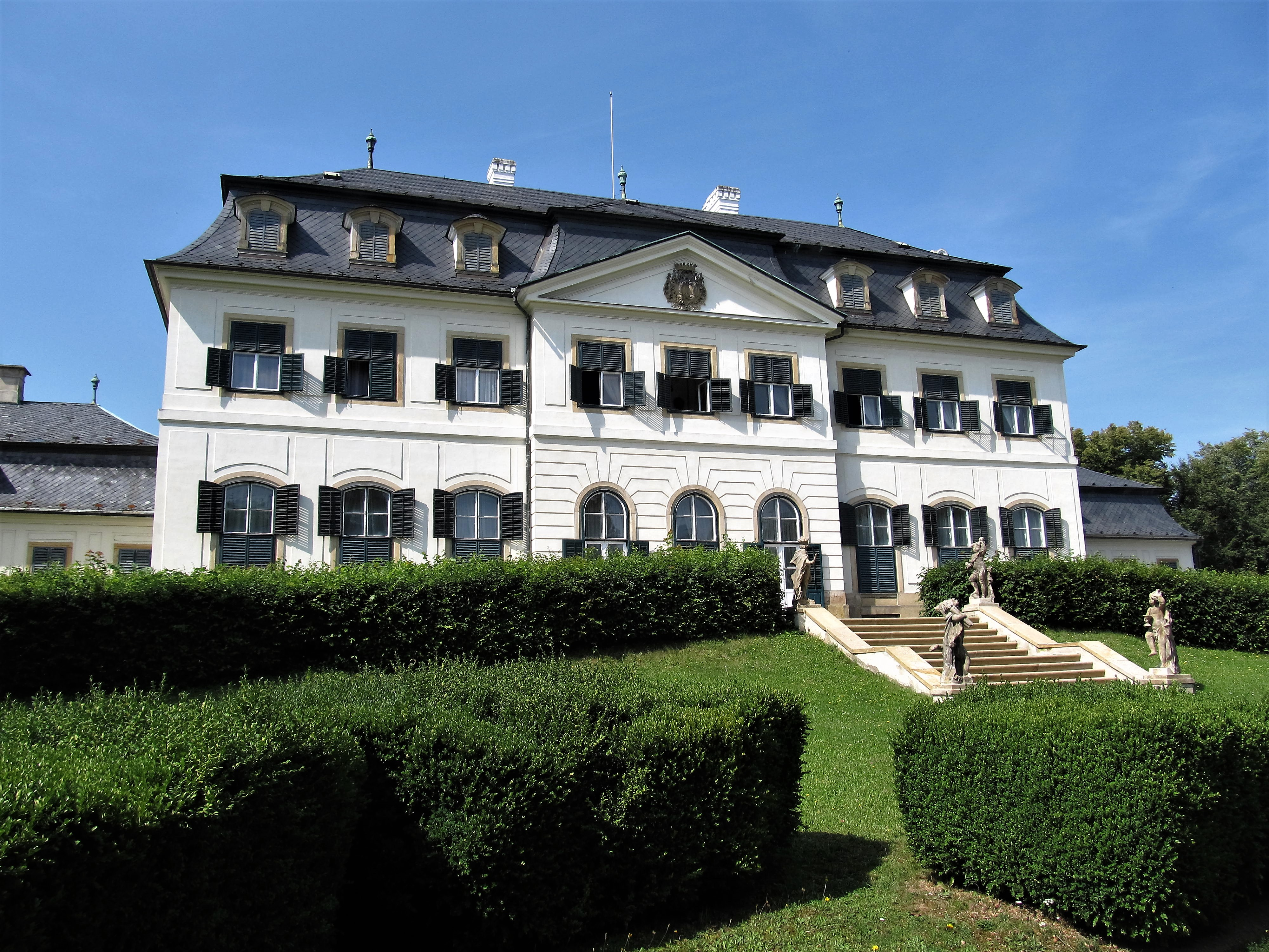 Hlavní budova zámku pohledem ze zahrady